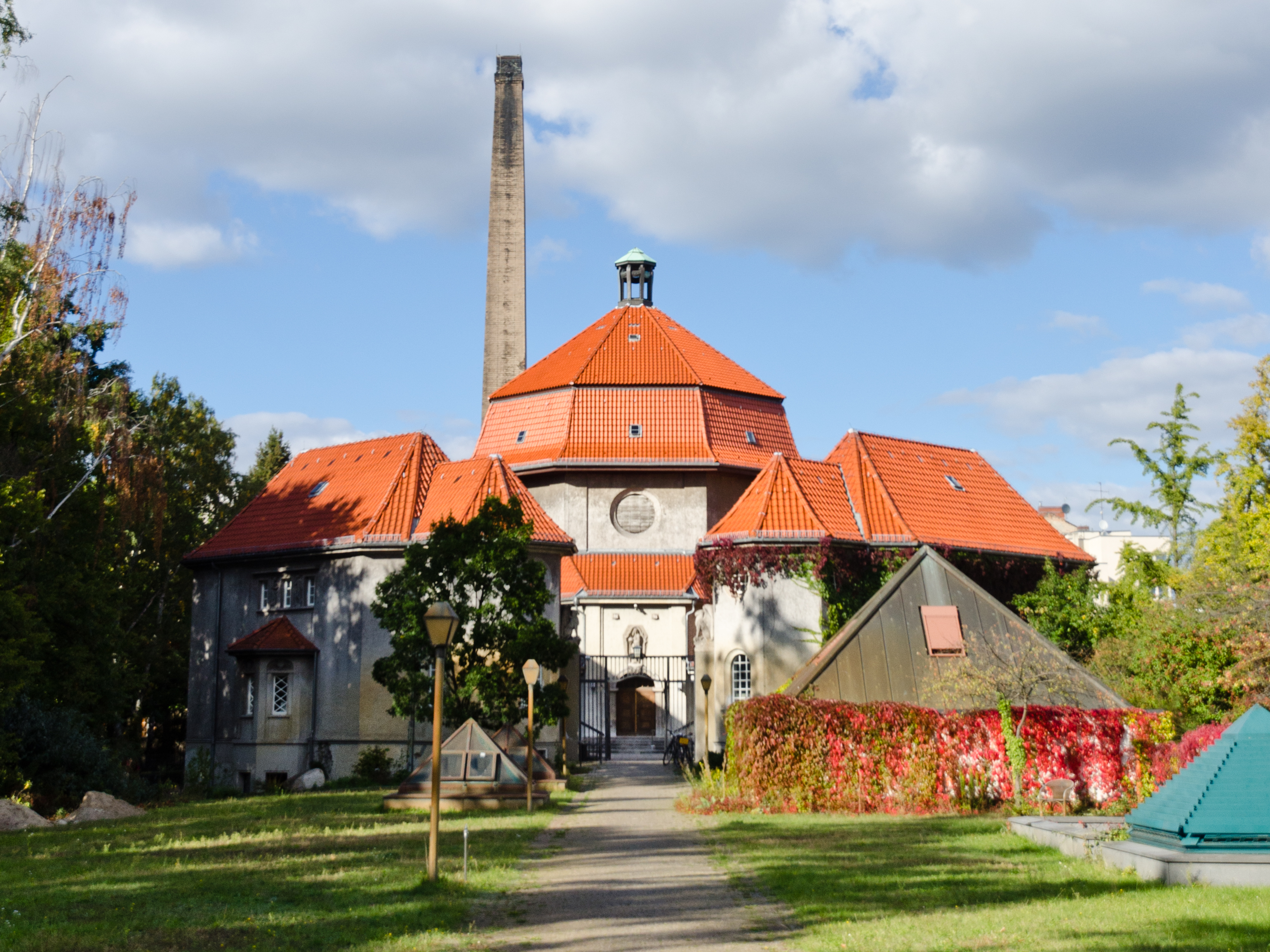 Gerichtstraße 37–38/Adolfstraße Plantagenstraße, Krematorium Wedding, 1909–10 von William Müller, Erweiterungsbau zum vollständigen Krematorium 1913–1915 von Hermann Jansen (siehe Gartendenkmal Gerichtstraße 37–38)This is a photograph of an architectural monument.